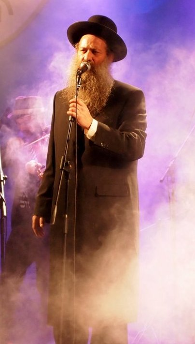 }שולי רנד